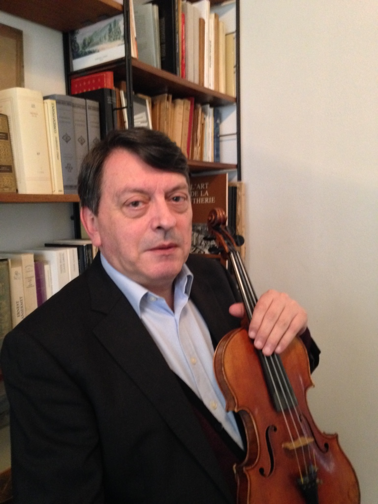 Photographie du violoniste français Alexis Galpérine chez lui le 1er Juin 2016